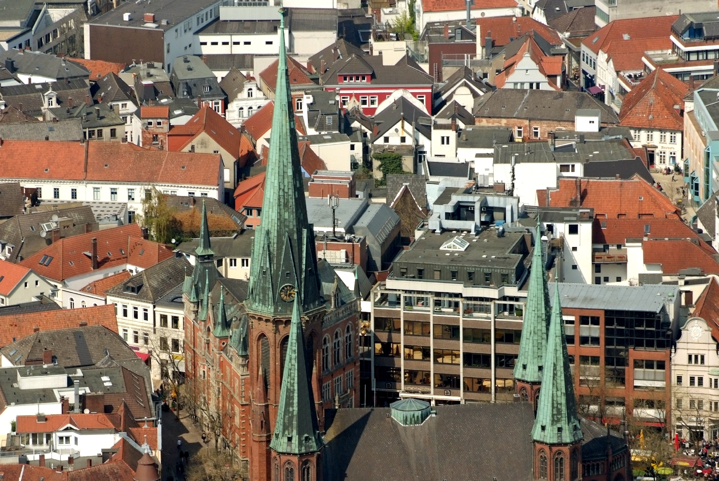 Fotoflug von Nordholz-Spieka nach Oldenburg und Papenburg